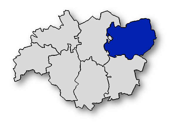 Powiat pułtuski z uwzględnieniem Gminy Obryte